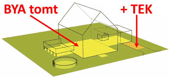 Lover, forskrifter, rettsavgjørelser og andre vedtak av offentlig myndighet er uten vern etter denne lov. Det samme gjelder forslag, utredninger og andre uttalelser som gjelder offentlig myndighetsutøvelse, og er avgitt av offentlig myndighet, offentlig oppnevnt råd eller utvalg, eller utgitt av det offentlige. Likeledes er offisielle oversettelser av slike tekster uten vern etter denne lov.